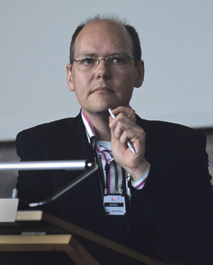 Prof. Dr. Peter Geimer, Zürich 2007